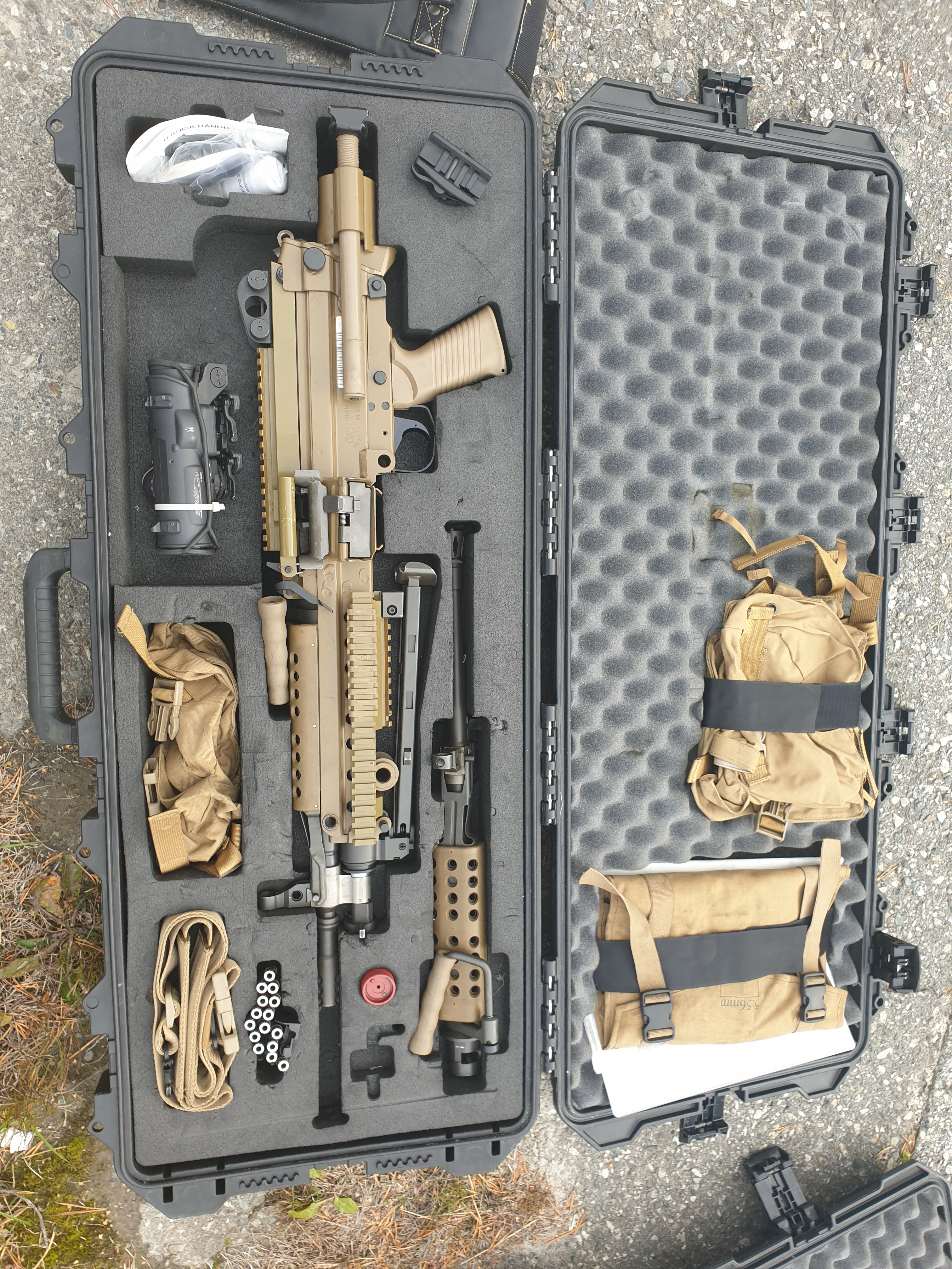 Minimi para med tilhørende utstyr